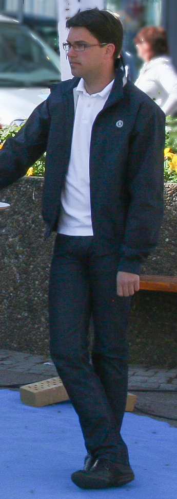 Sverigedemokraternas partiledare Jimmie Åkesson på ett torgmöte i Uddevalla inför EU-valet 2009.